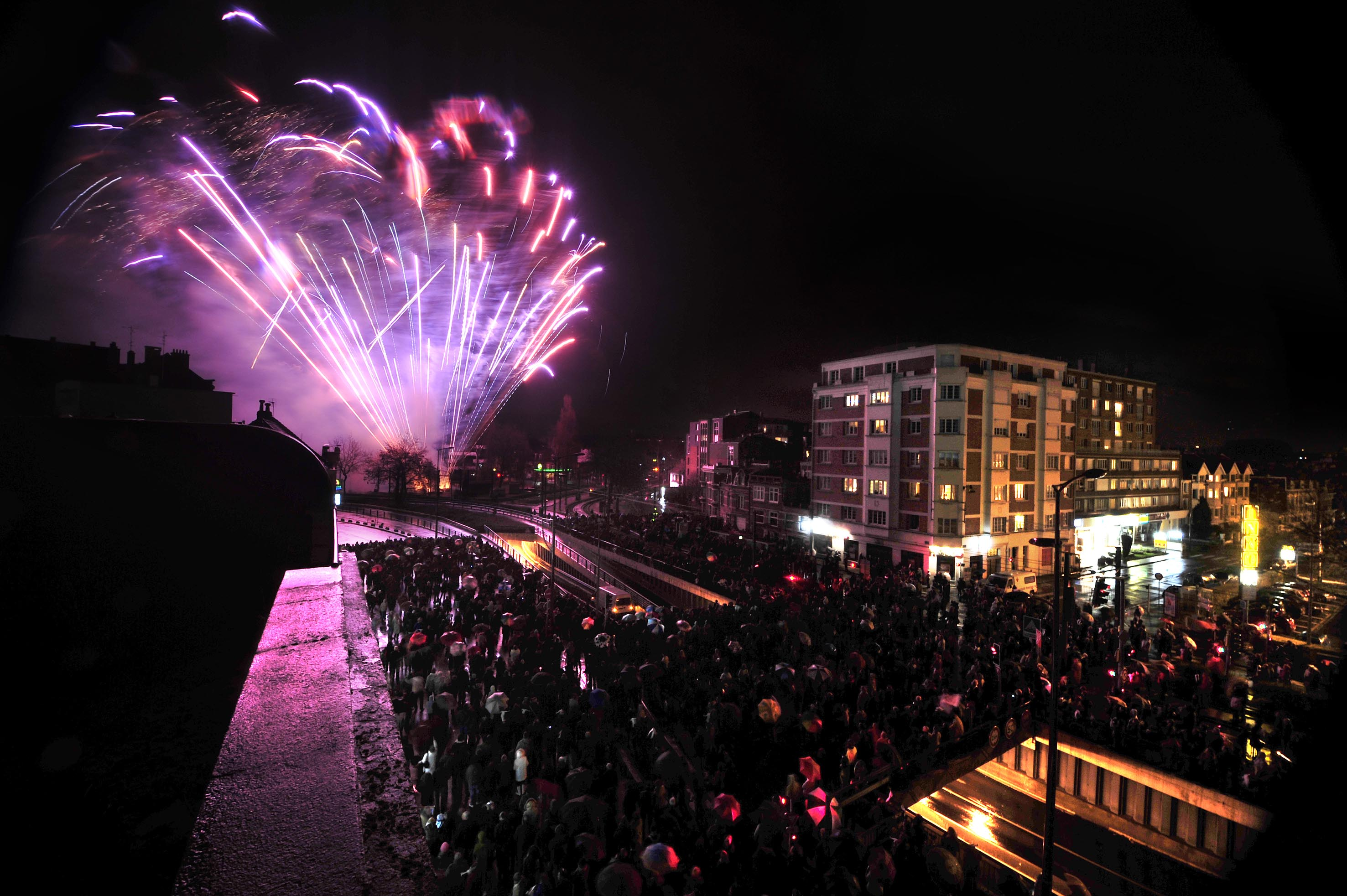 Lille (Nord, Nord-Pas-de-Calais, France) : Dans le cadre des 100 ans du Grand Boulevard, le groupe F a illuminé le Croisé-Laroche le 28 novembre 2009. Ces festivités était en autre gérées par LMCU.